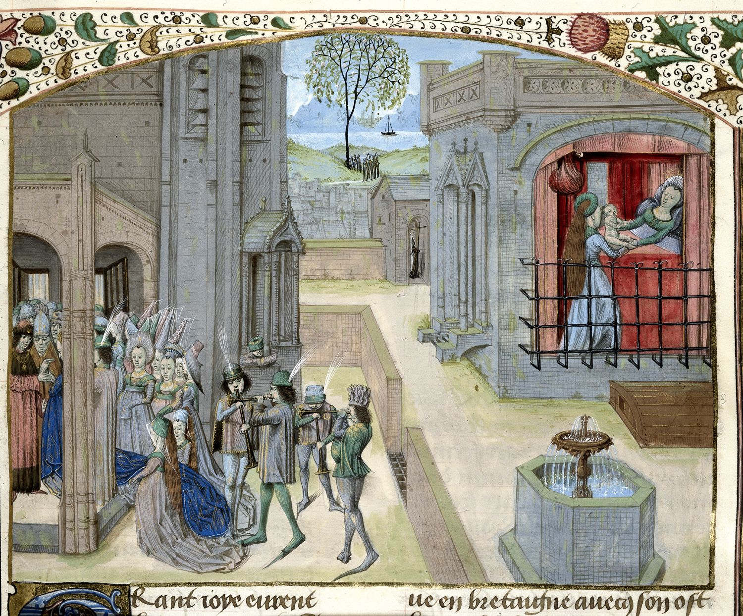 Royal 15 E IV f. 73 Constans and Helena Anciennes et nouvelles chroniques d'Angleterre, volume 1